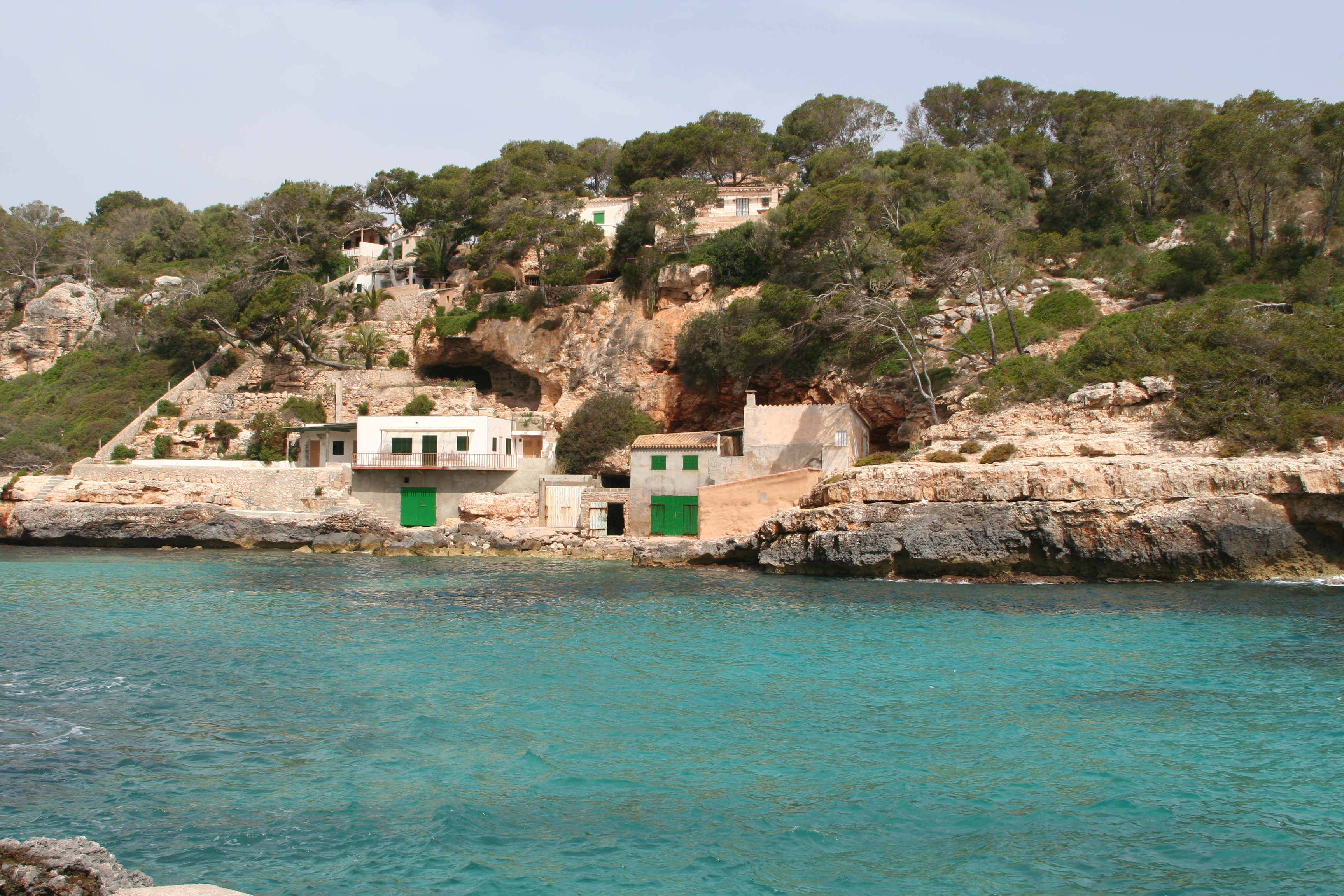 Bildbeschreibung: Cala Llombards Quelle: selbst fotografiert Fotograf/Zeichner: Andreas Wein Datum: 17.05.2006 Sonstiges: ...